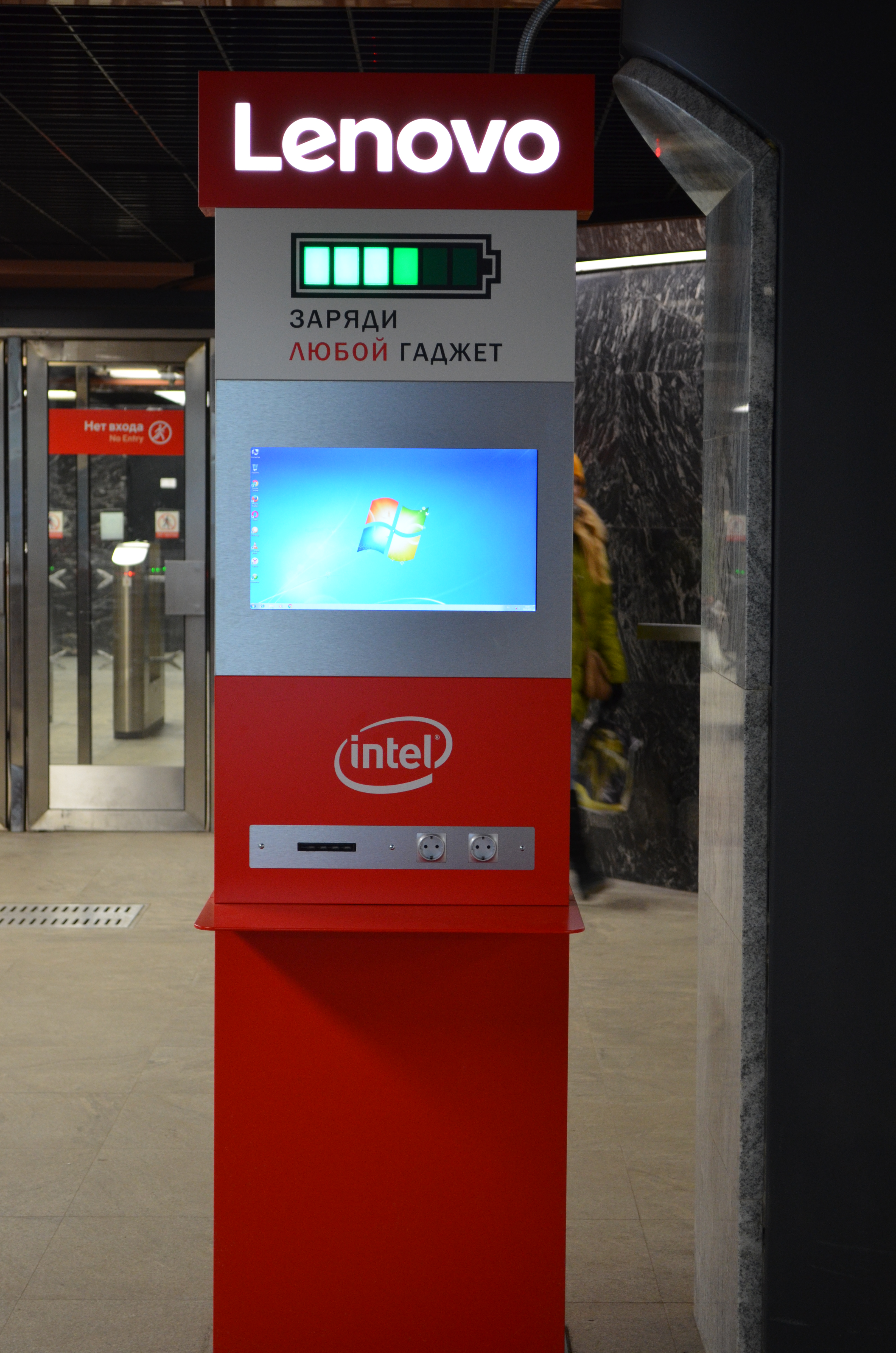 Автомат фирмы «Lenovo» для зарядки гаджетов на станции метро «Борисово». Розетки есть с обеих сторон автомата. Появился осенью 2016 года.